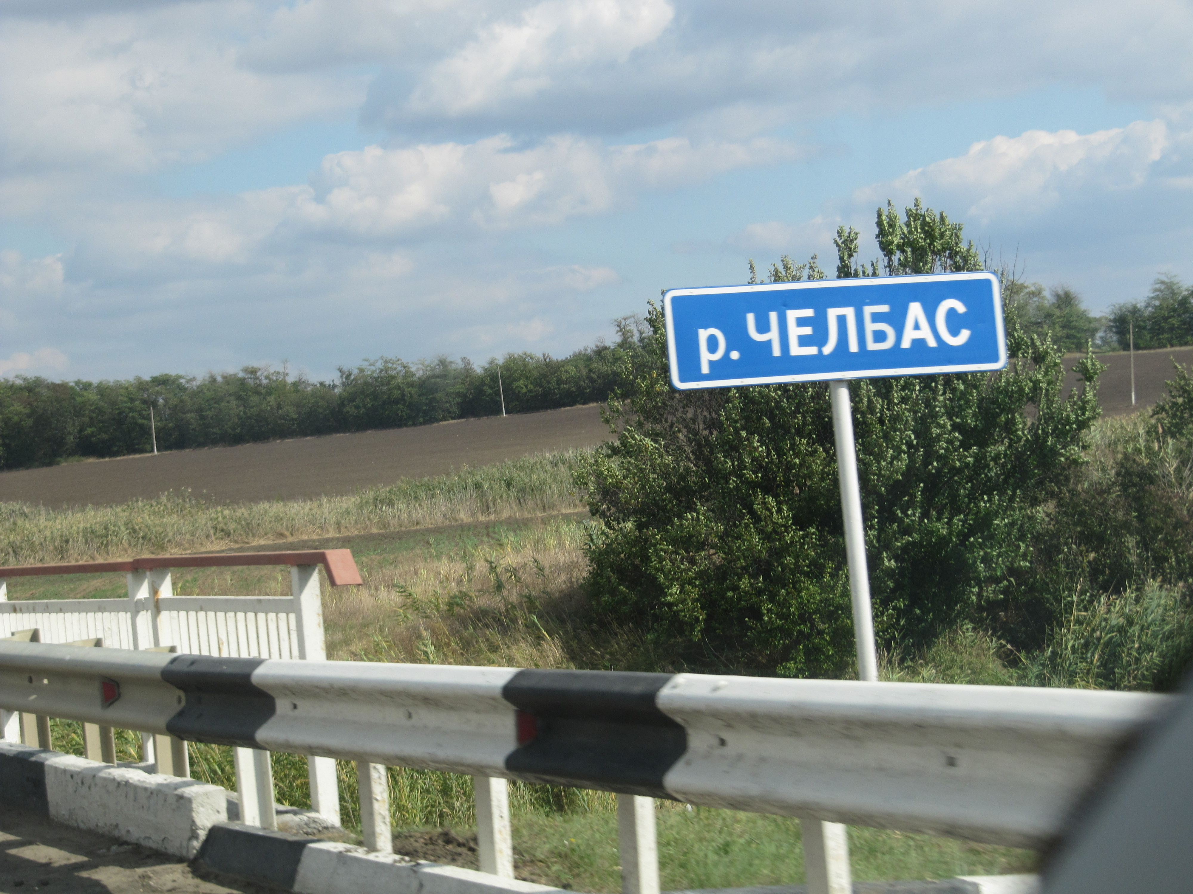 Указатель реки Челбас